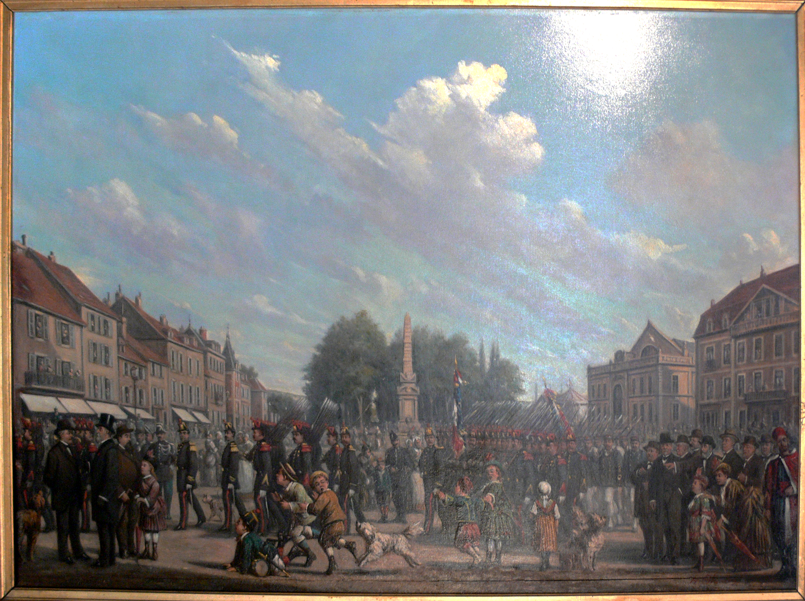 Henry Blandin (1830-1890), Défilé de la compagnie des sapeurs pompiers place Neuve à Vesoul, 1882, huile sur toile. Vesoul, musée Georges-Garret, inv. 887.1.2., don de l'artiste (1887)